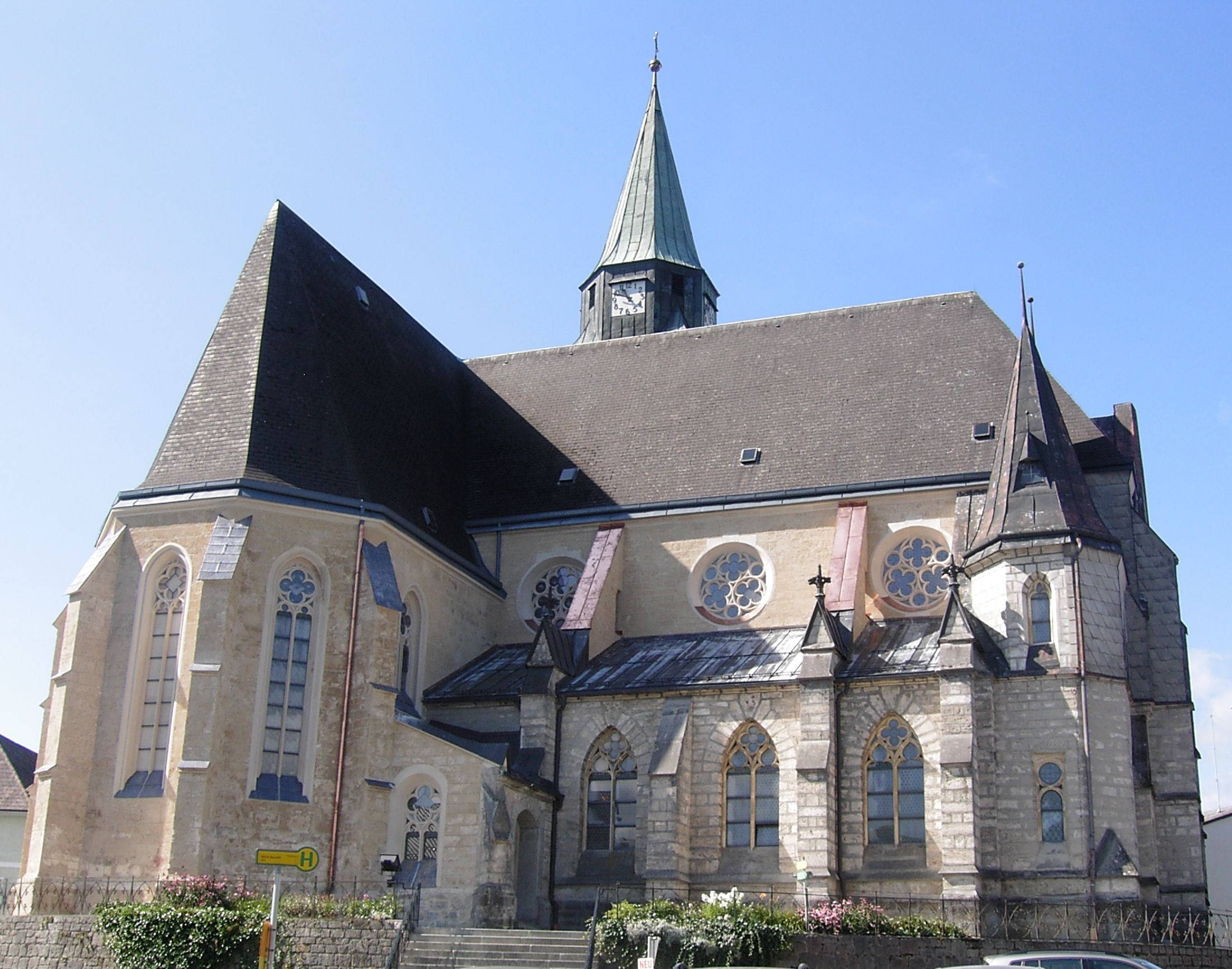 Maria Neustift Kath.Pfarrkirche, Nordansicht